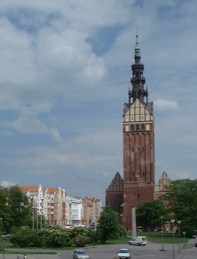 Poland, Elblag (Elbing) - St. Nicolaus church.